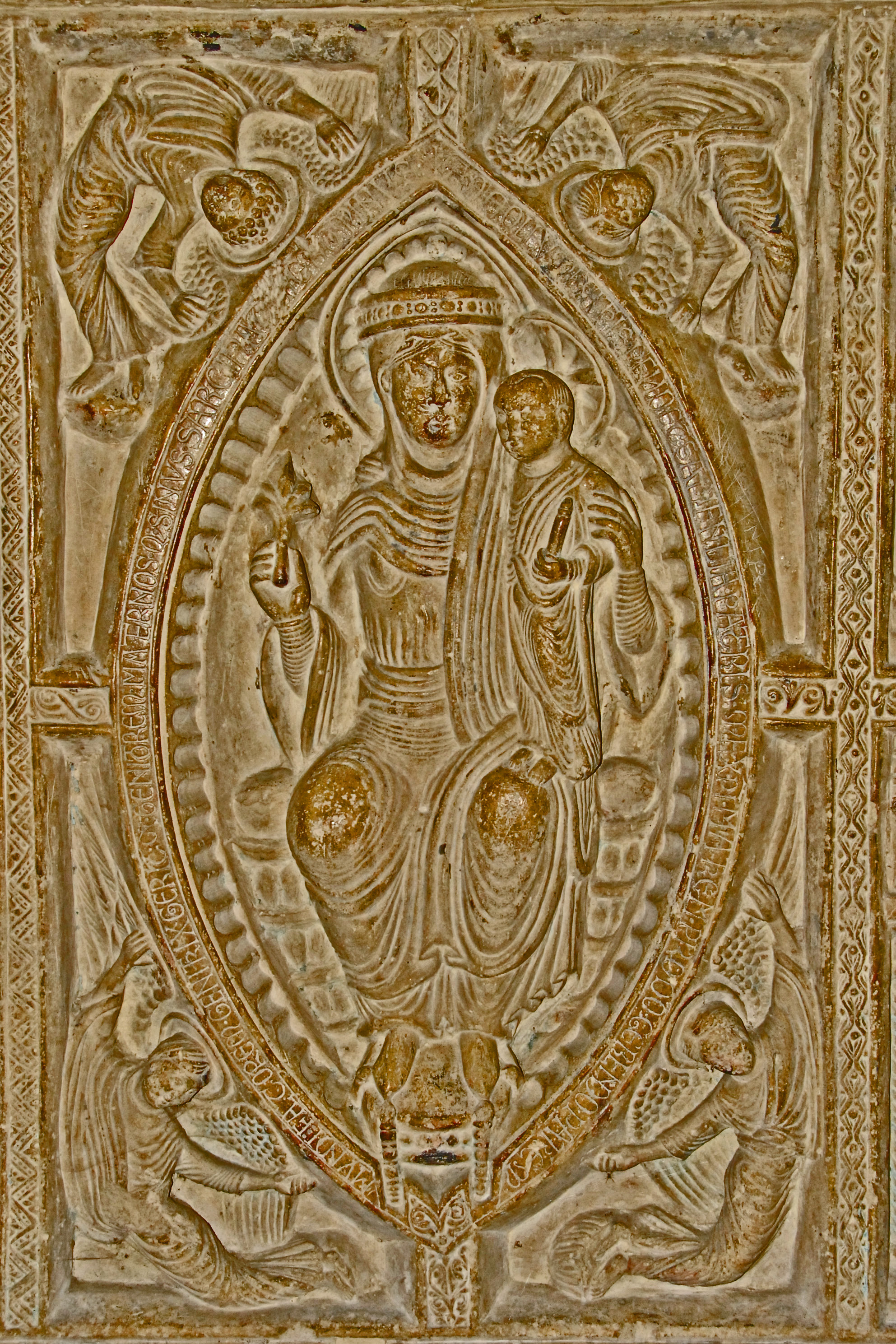 St-Junien, Sarkophag, Nordseite, Maria in der Mandorla